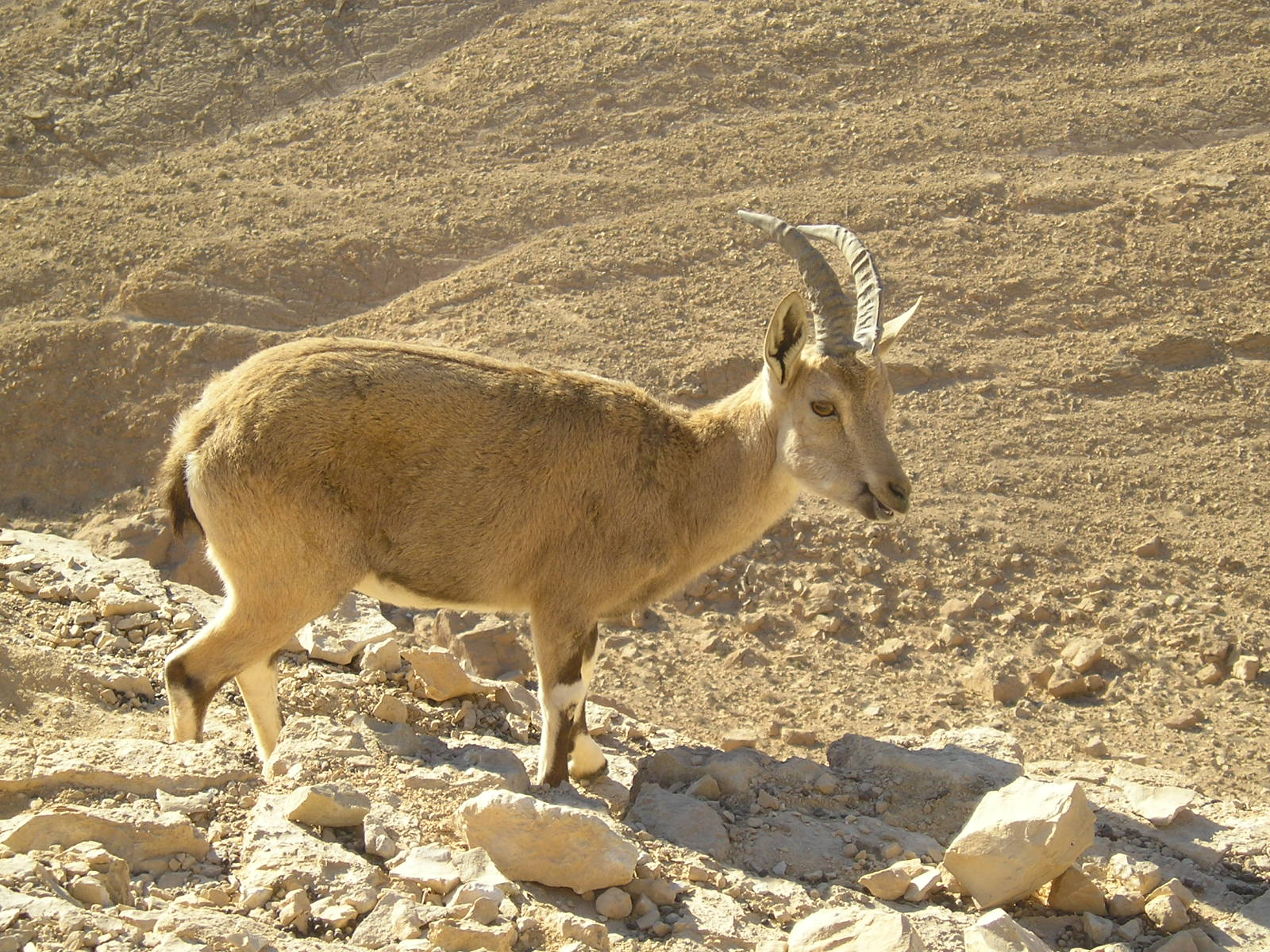 Nubian Ibex in Negev